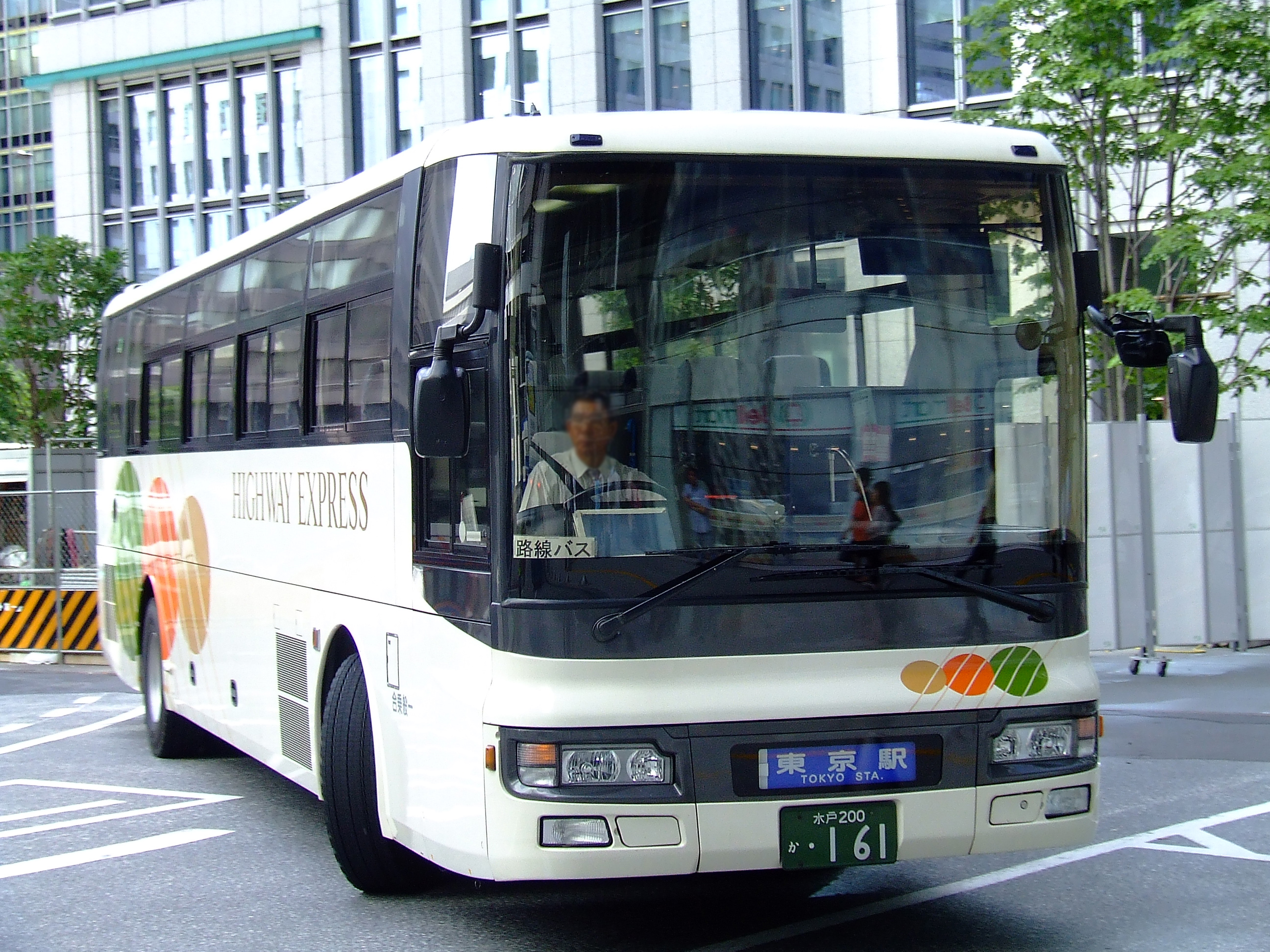 日立電鉄交通サービスの高速バス「日立号」 東京駅にて